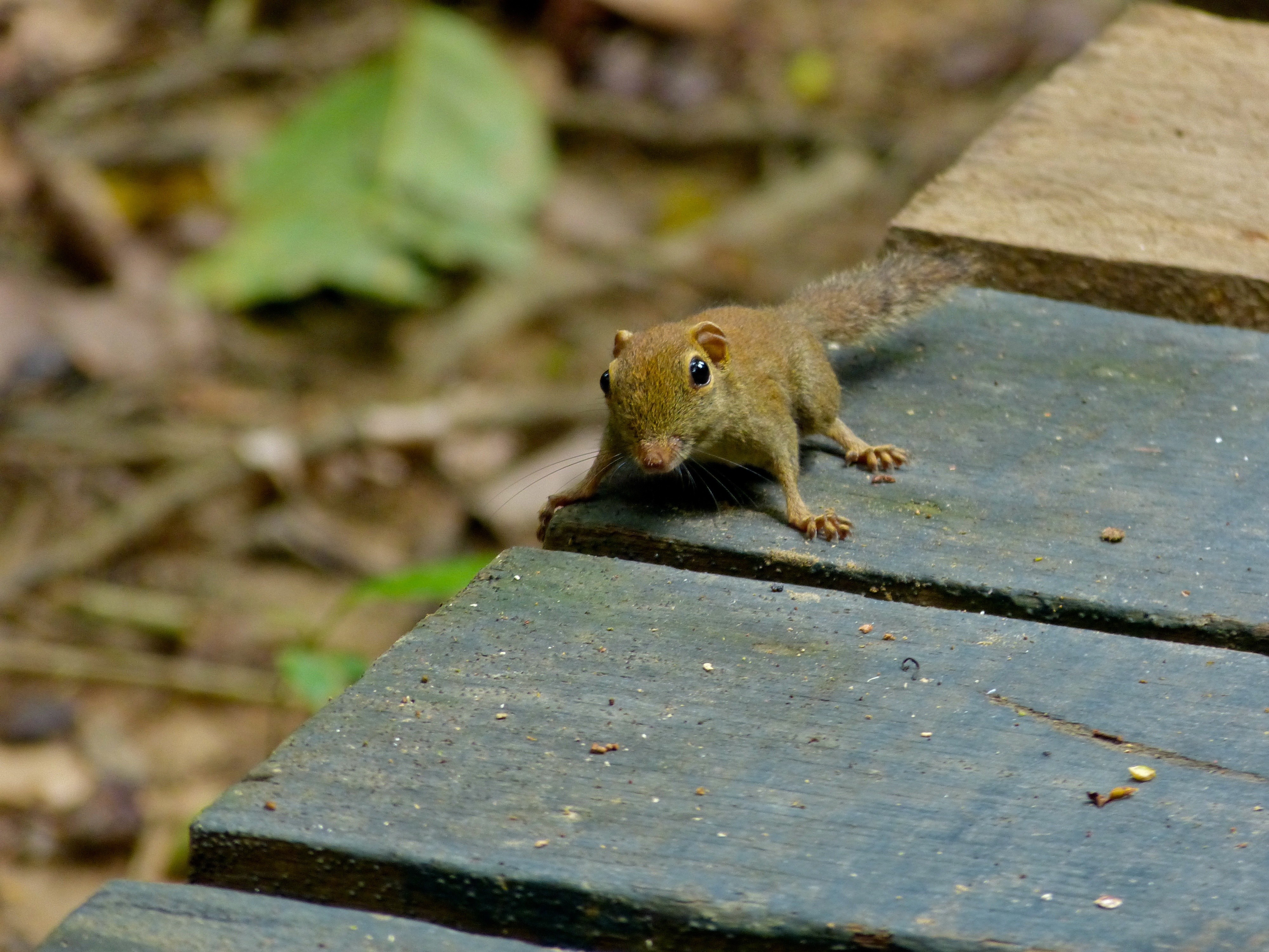 Uncle Tan's Jungle Camp, Kinabatangan River, Sabah, MALAYSIA